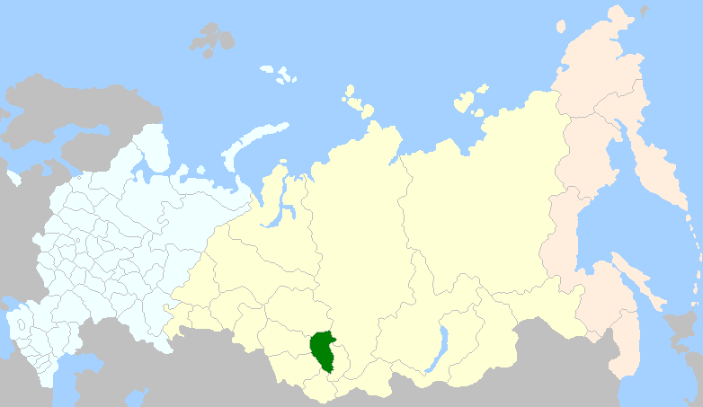 régions administratives occupées en 2008 par les Teleoutes